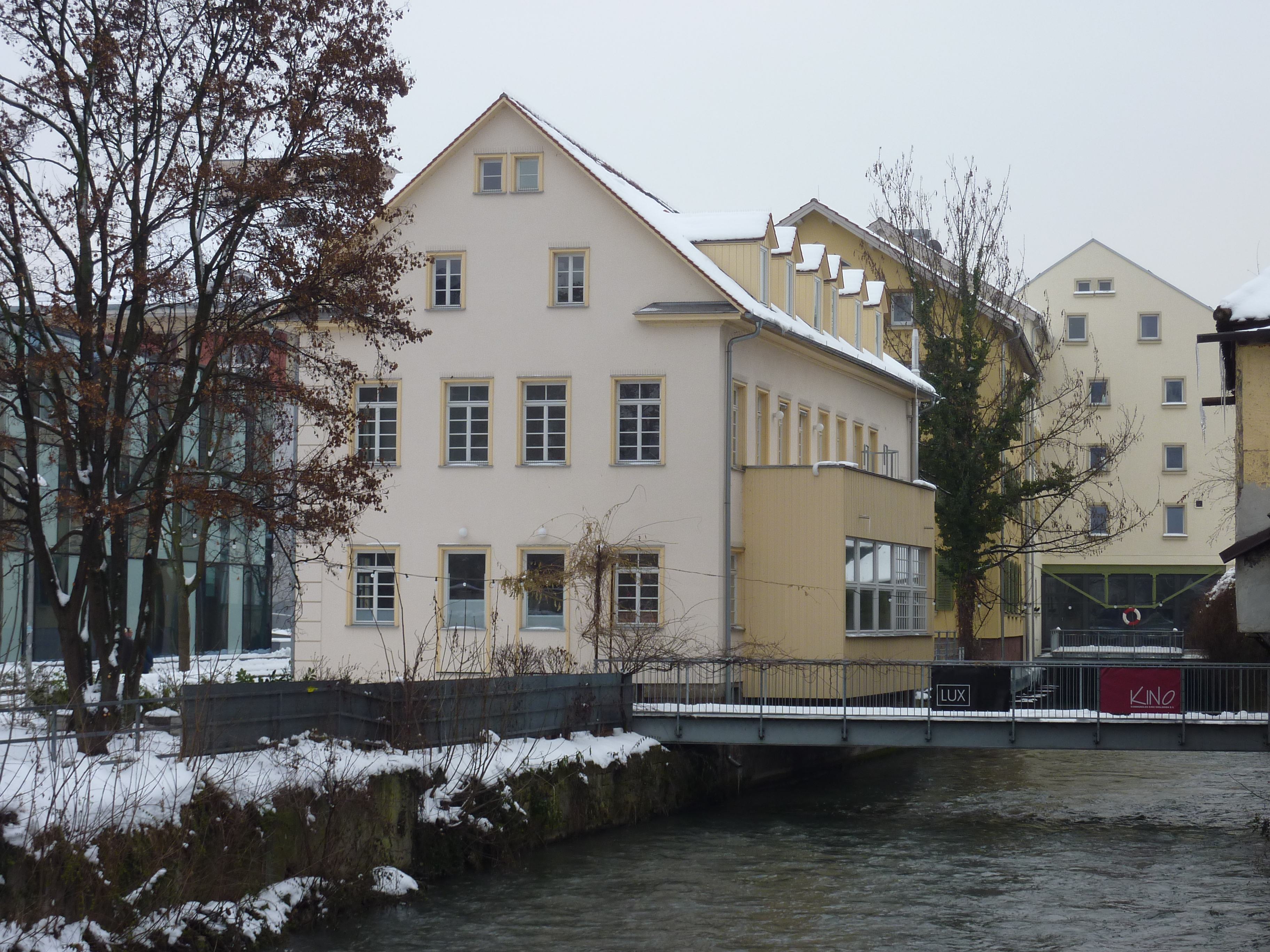 Kanalstr. 12/1 in Esslingen